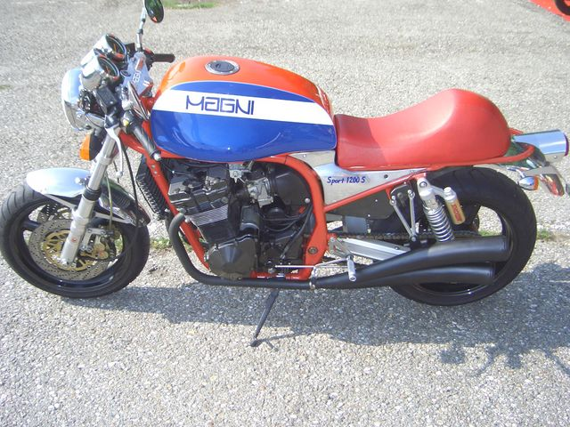 Magni Sport 1200 S